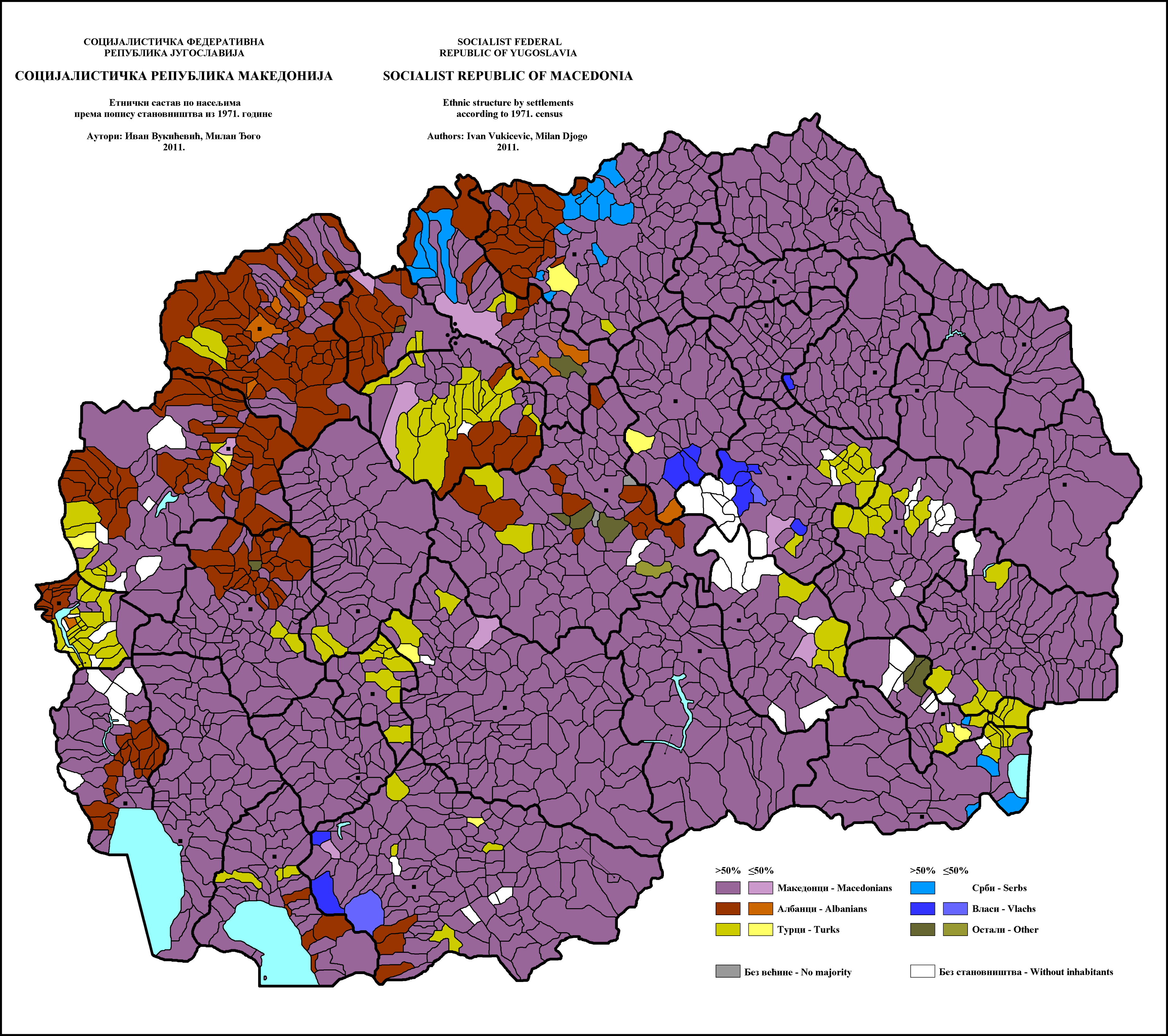 Етнички састав Македоније по насељима 1971. године. Аутори: Иван Вукићевић - , Милан Ђого